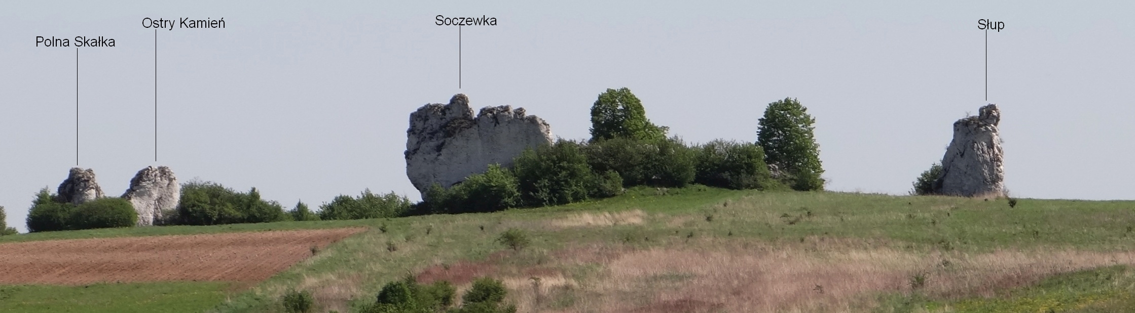 Ostańce Jerzmanowickie, widok od zachodniej strony